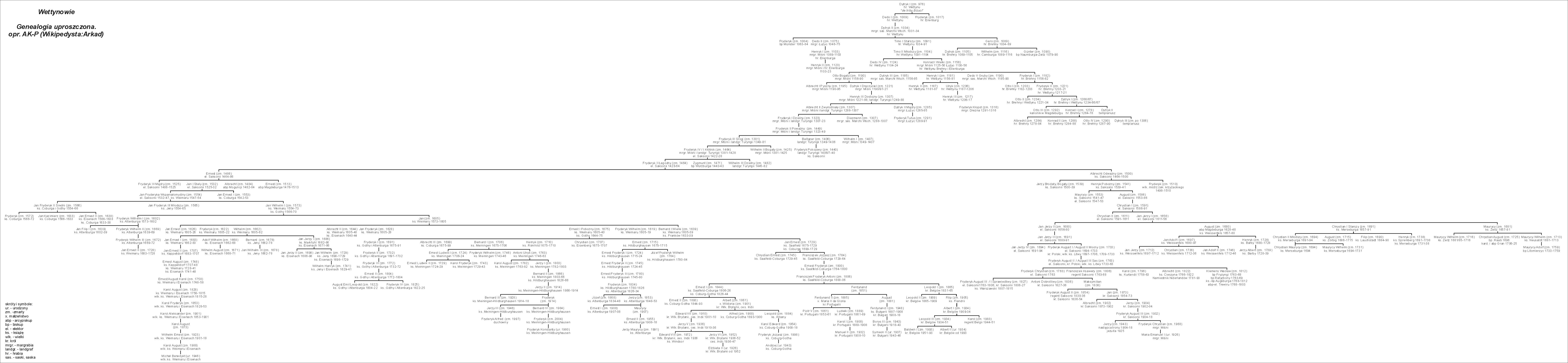 Genealogia uproszczona Wettynów (opr. AK-P)